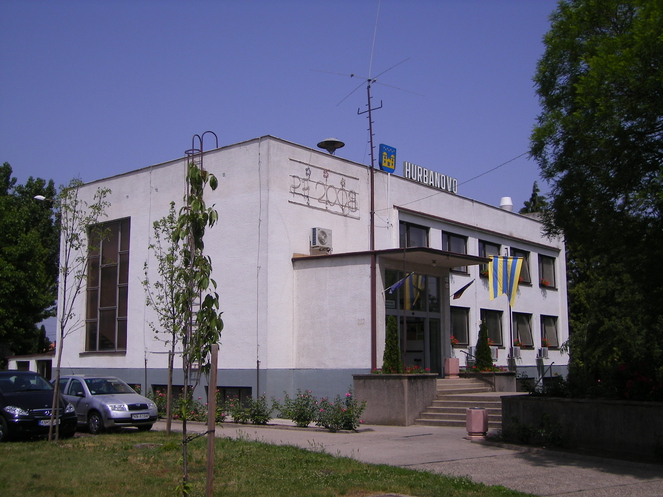 Ógyalla - városháza